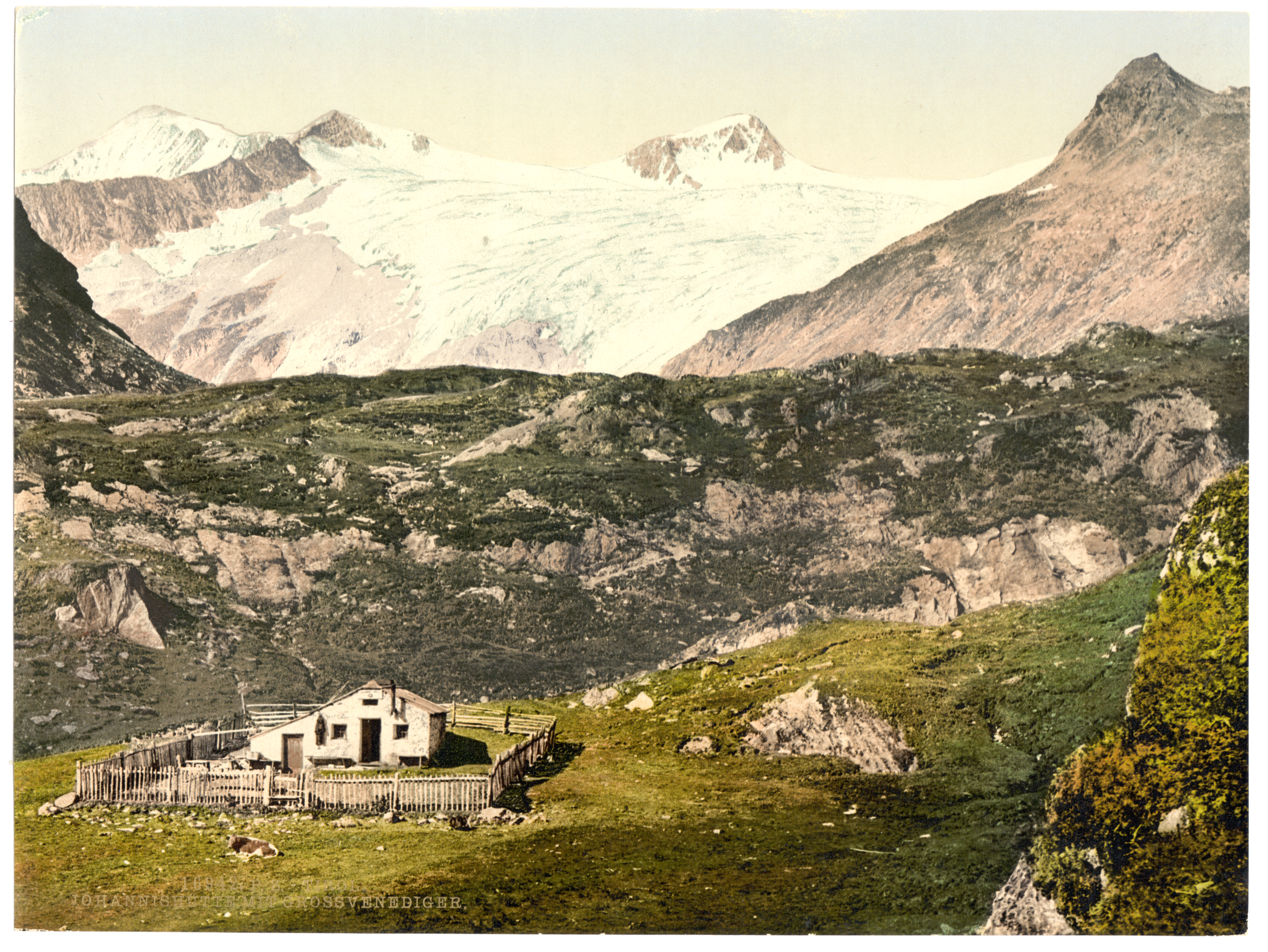 Johannishütte mit Großvendiger um 1900 (der Gipfel des Großvenedigers befindet sich am linken Bildrand. Knapp rechts der Bildmitte das Rainerhorn, darunter das Innere Mullwitzkees)